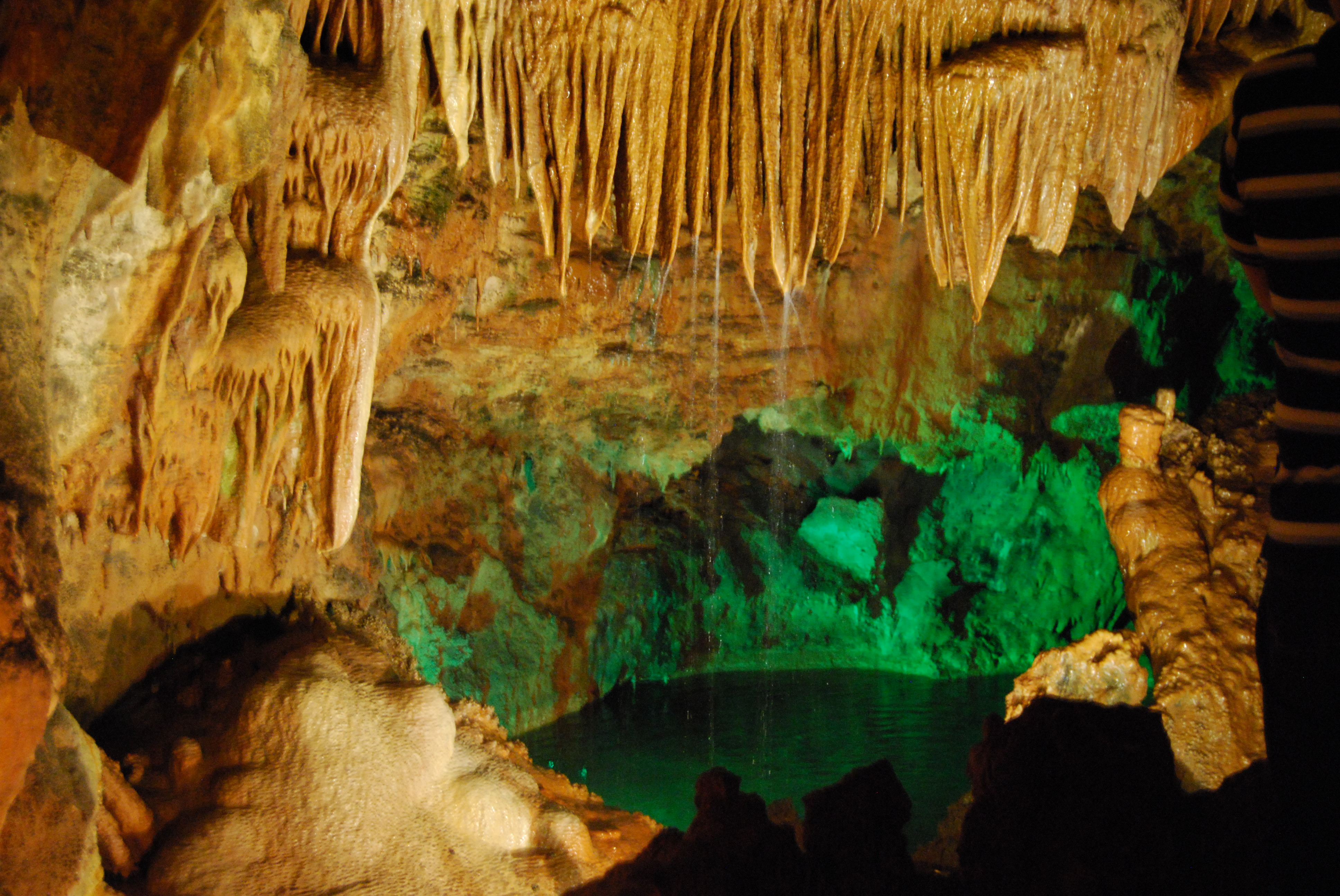 Gruta de Mira D'Aire, Serra de Aire, Portugal This is a photography of a Site of Community Importance in Portugal with the ID: PTCON0015. Natura2000 entry, EEA entry